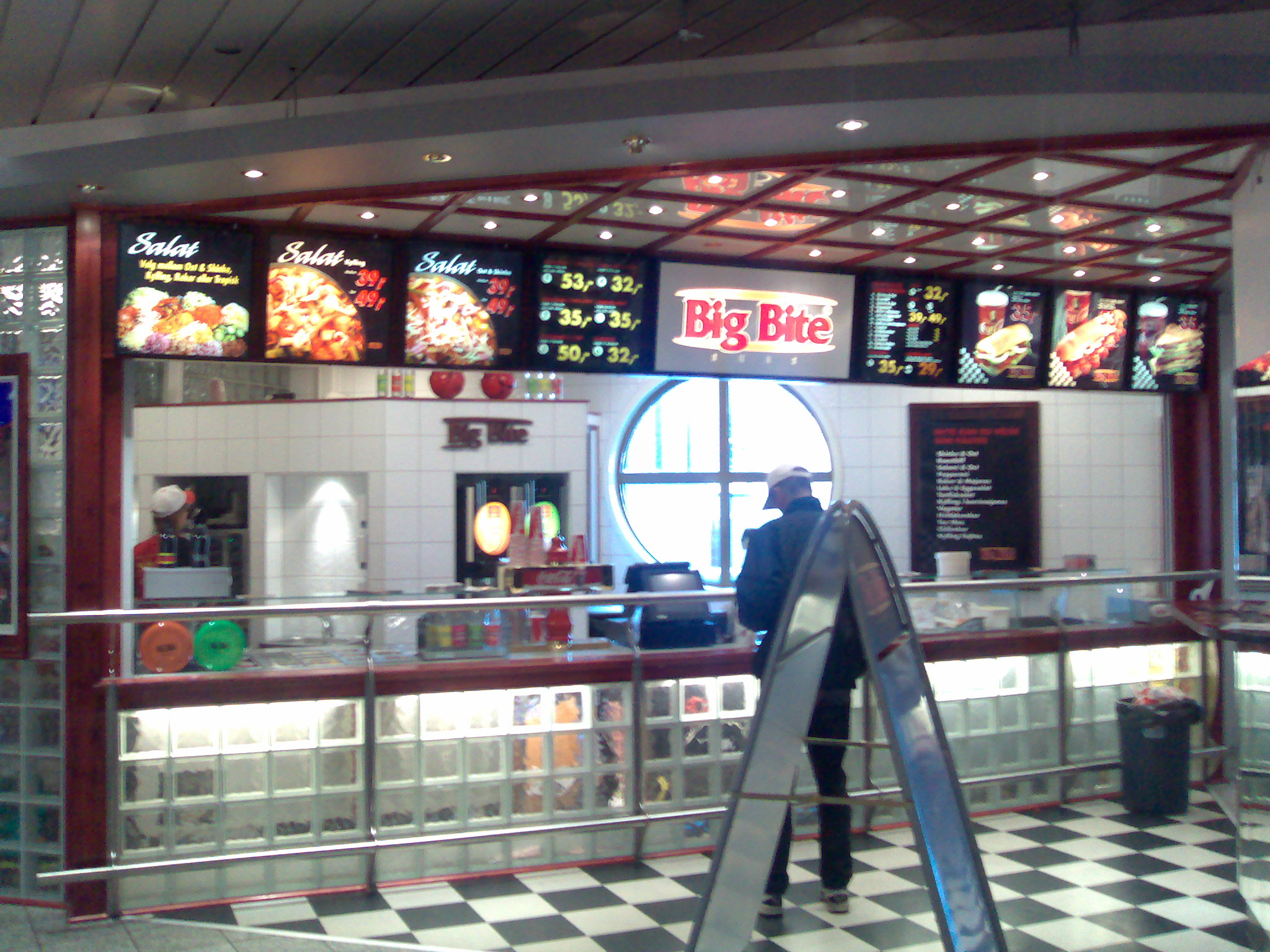 Big Bite i Kremmergaarden, Ålesund.